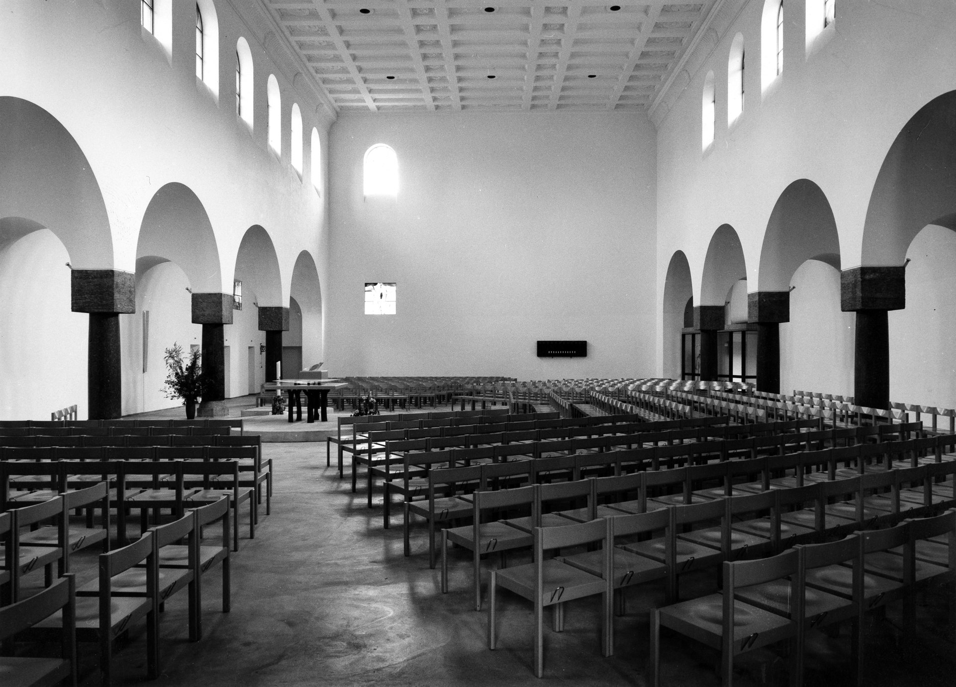 Römisch-katholische Pfarrkirche St. Franziskus Zürich-Wollishofen, Innenansicht 1973